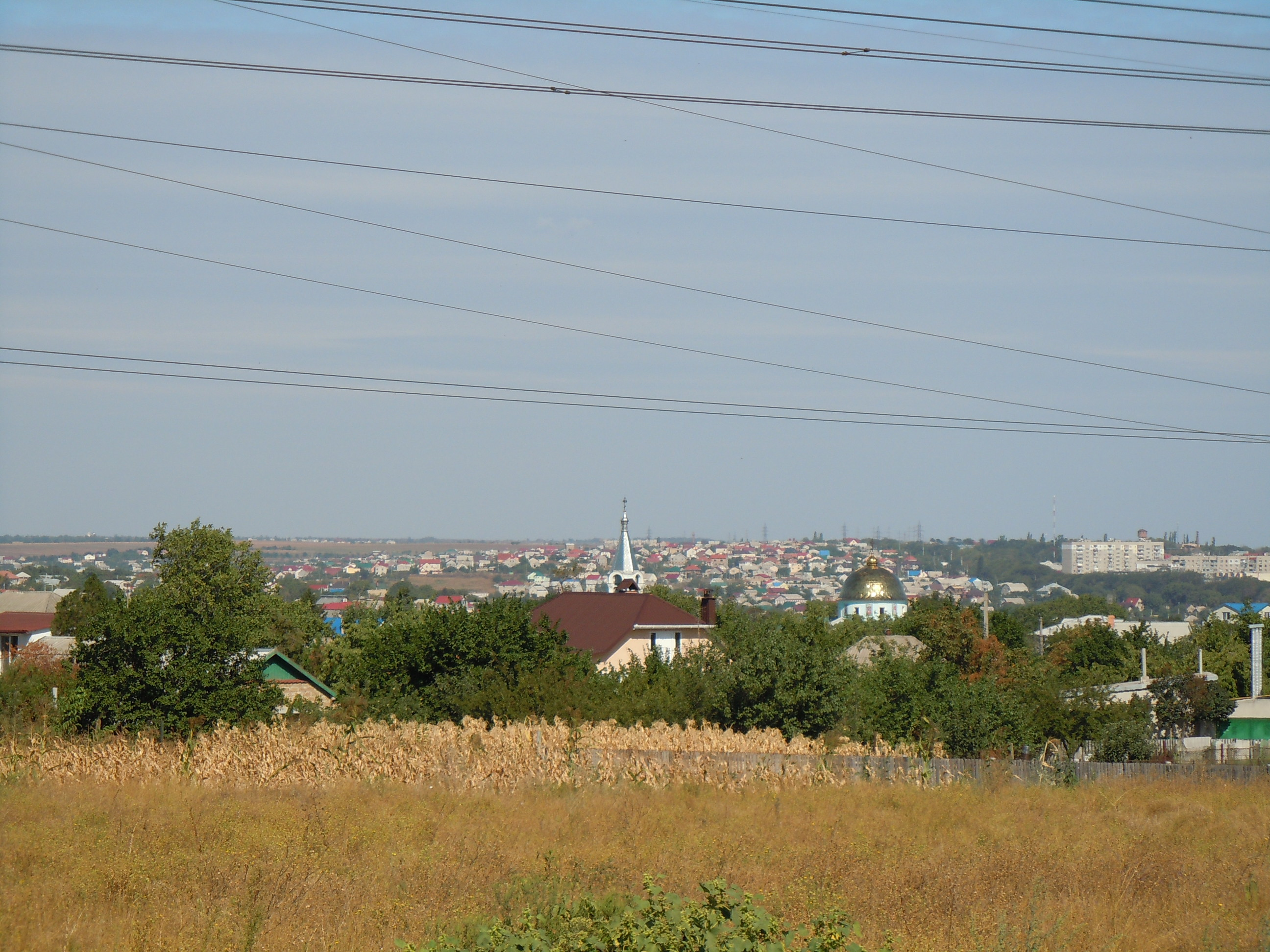 Вигляд на село Усатове